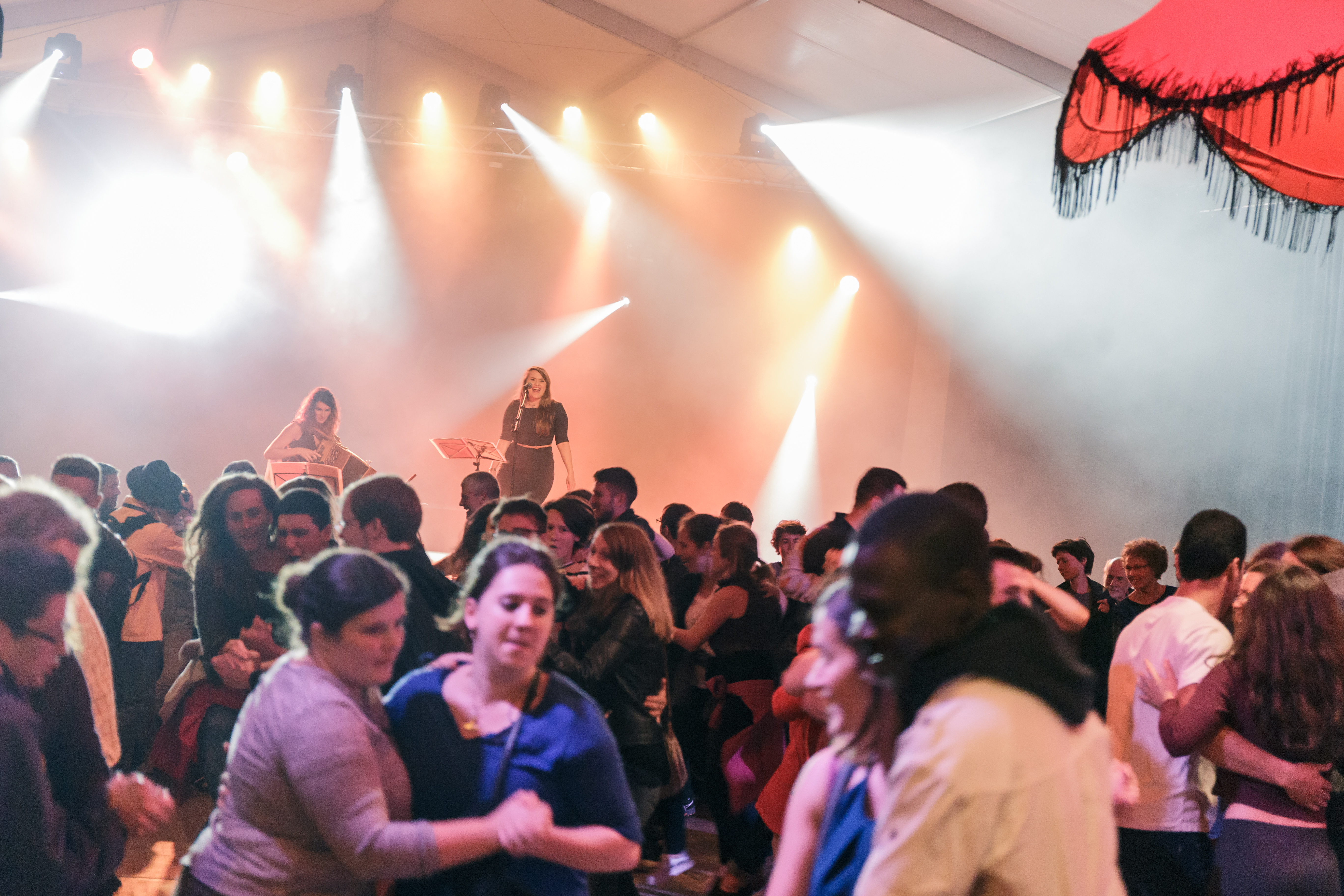 Le duo Gestin / Le Bihan (Magalie Gestin au chant, Marion Le Bihan à l'accordéon) en fest-noz au festival de Cornouaille à Quimper le 21 juillet 2017.